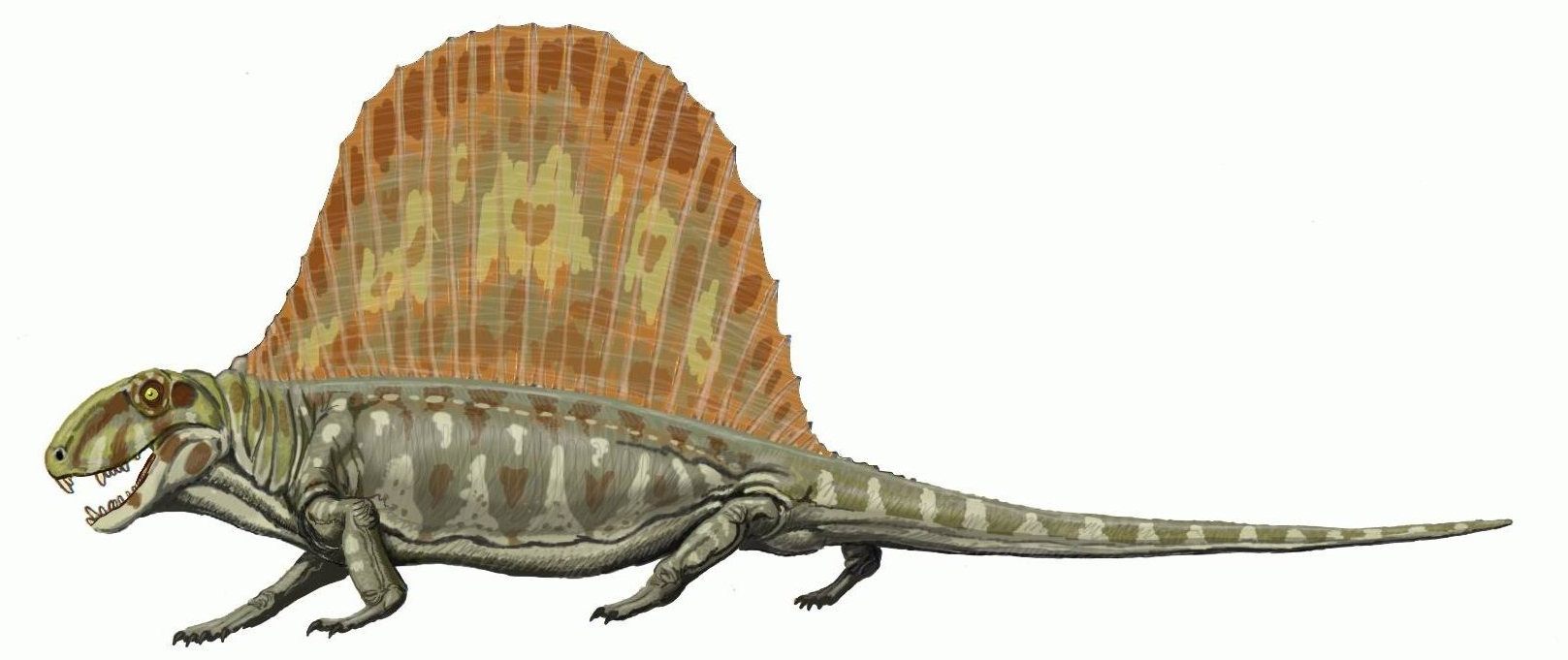 Dimetrodon_milleri - reconstruction autor - Bogdanov